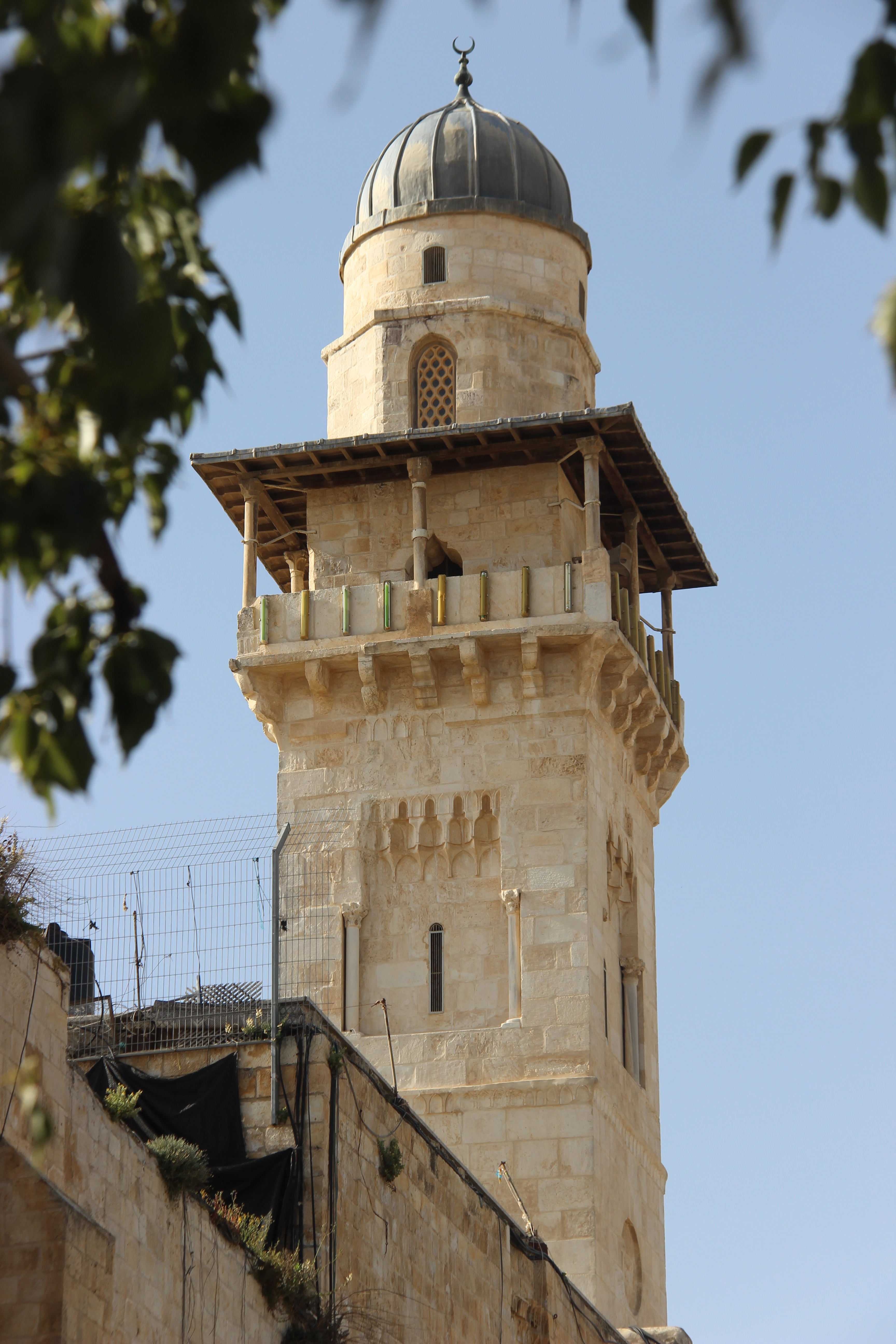 مئذنة باب السلسلة، إحدى مآذن المسجد الأقصى في القدس.